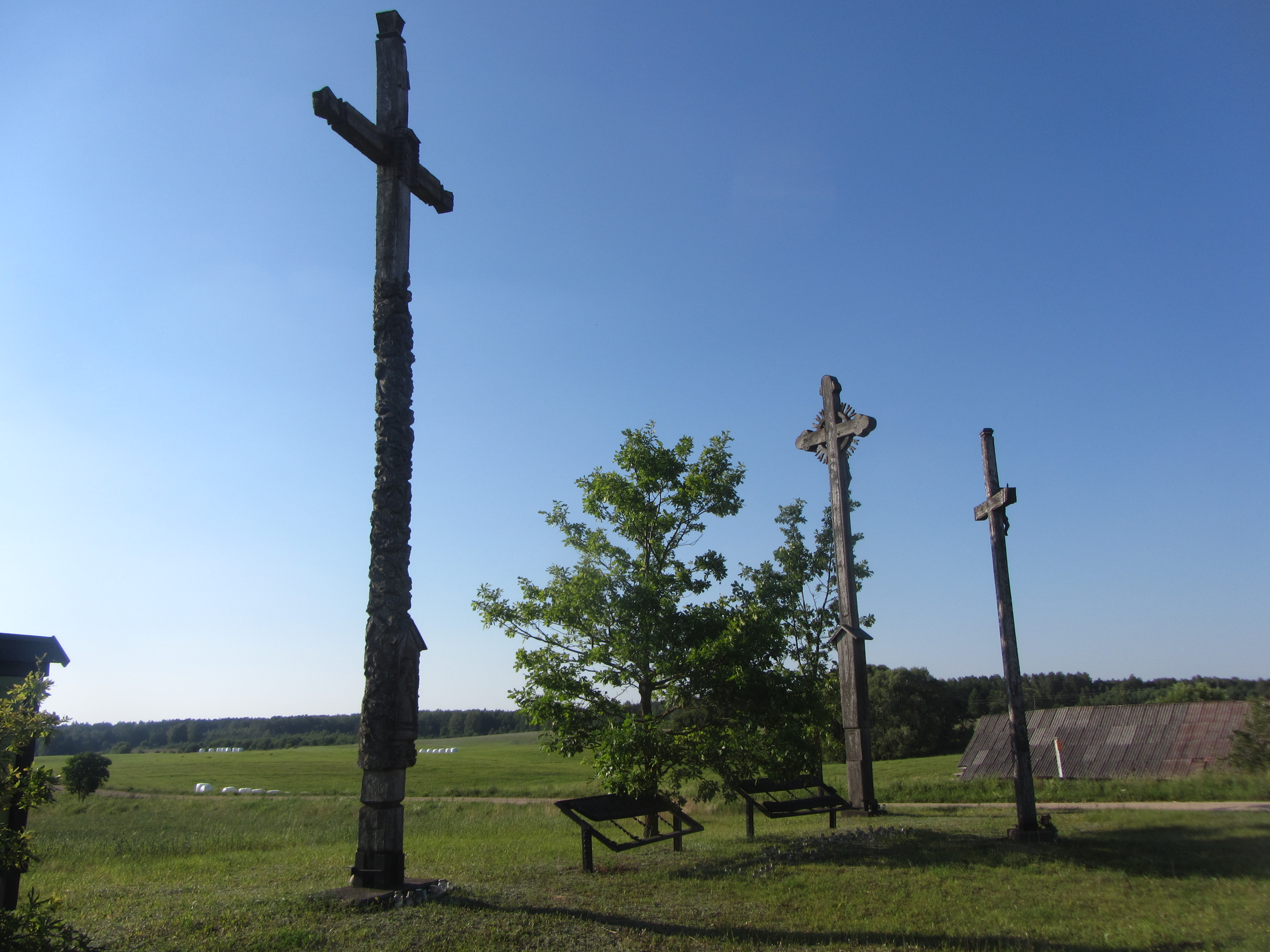 Raitininkų sen., Lithuania